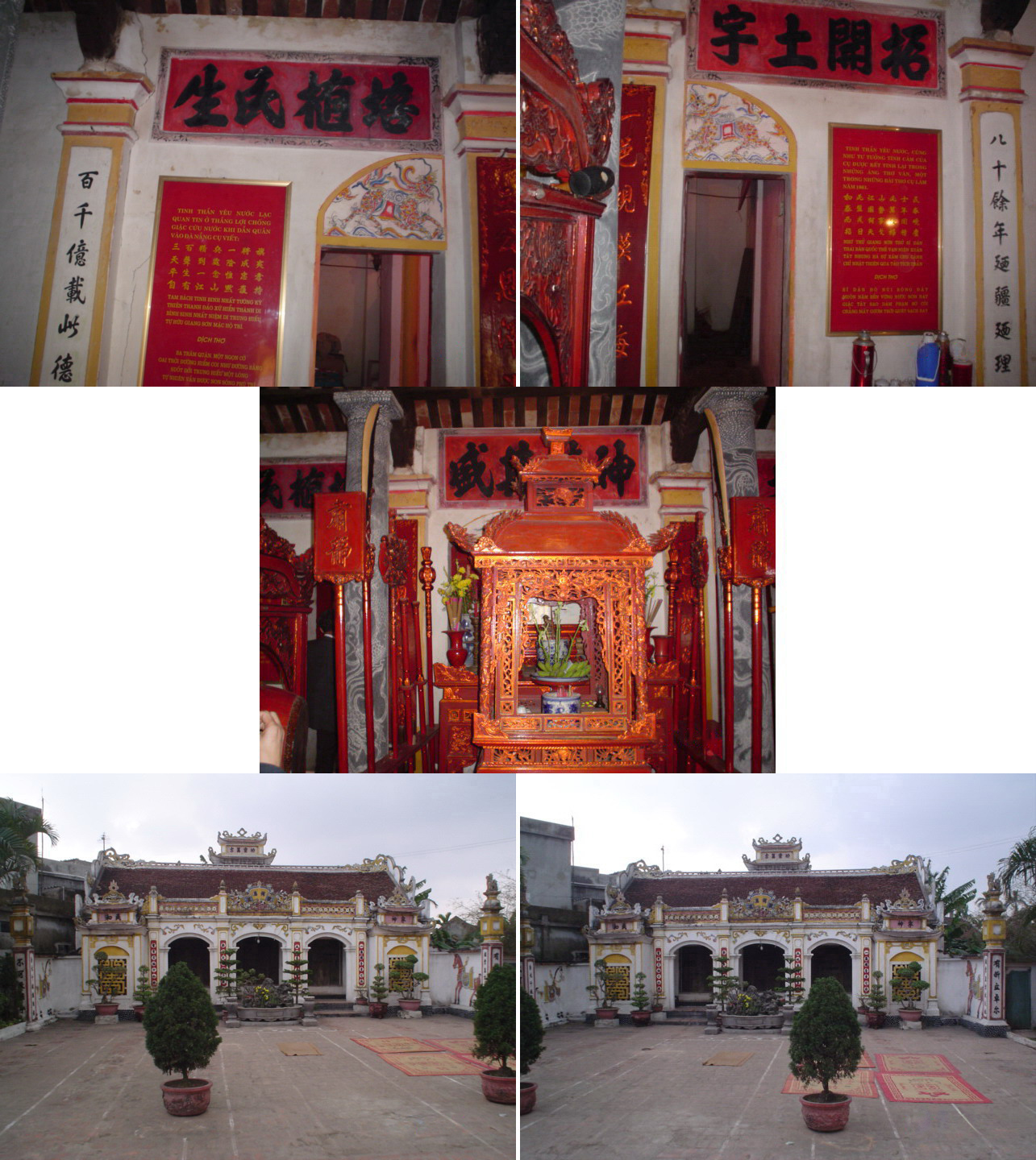 Hình tự chụp và chỉnh sửa